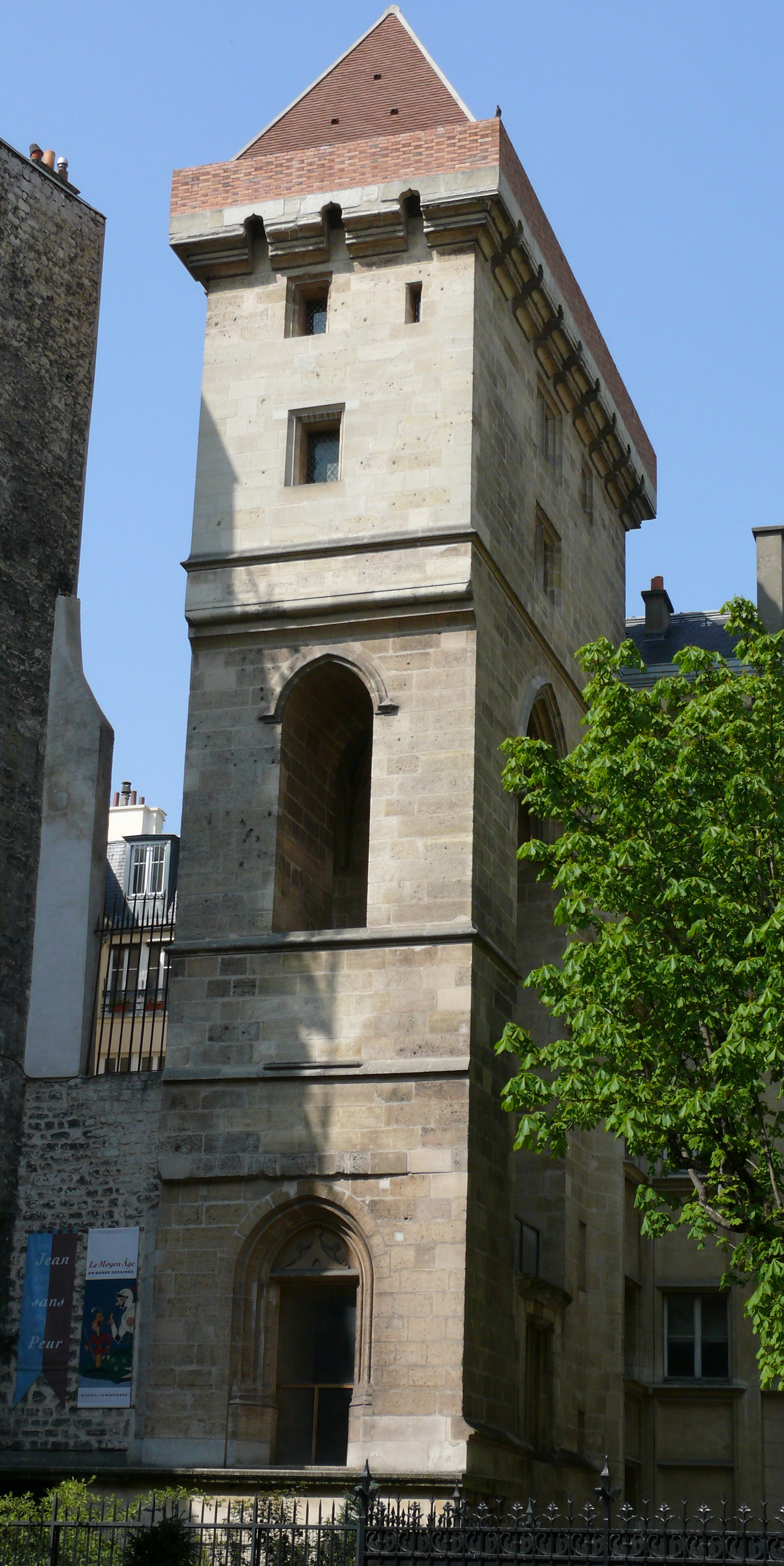 Paris - Tour Jean-sans-Peur